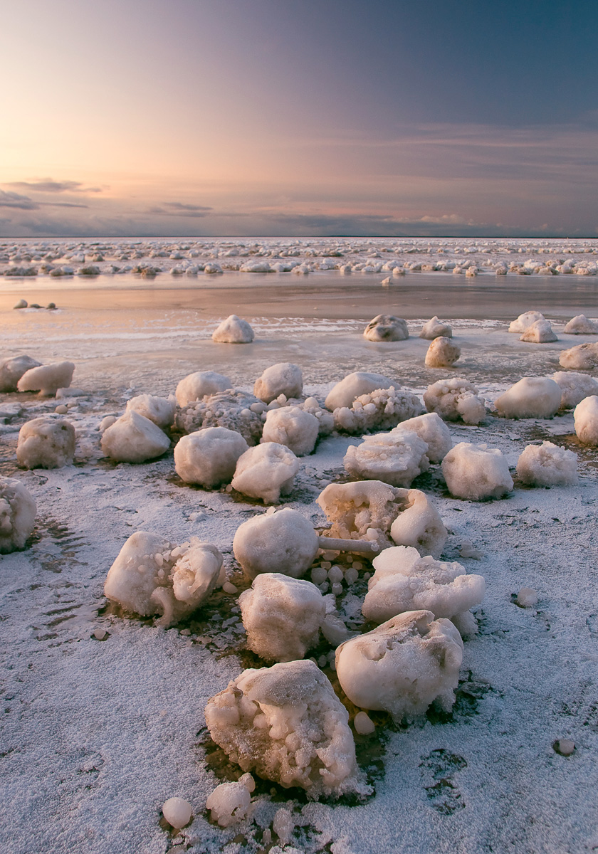 Reiu rand, kus pole ühtegi kivi, nägi 2009. aasta algul mõned päevad välja selline, nagu oleks rand täis loobitud külmunud palle. Tegemist on siiski vaid jääkamakatega, mille täpset tekkemehhanismi on raske aru saada.